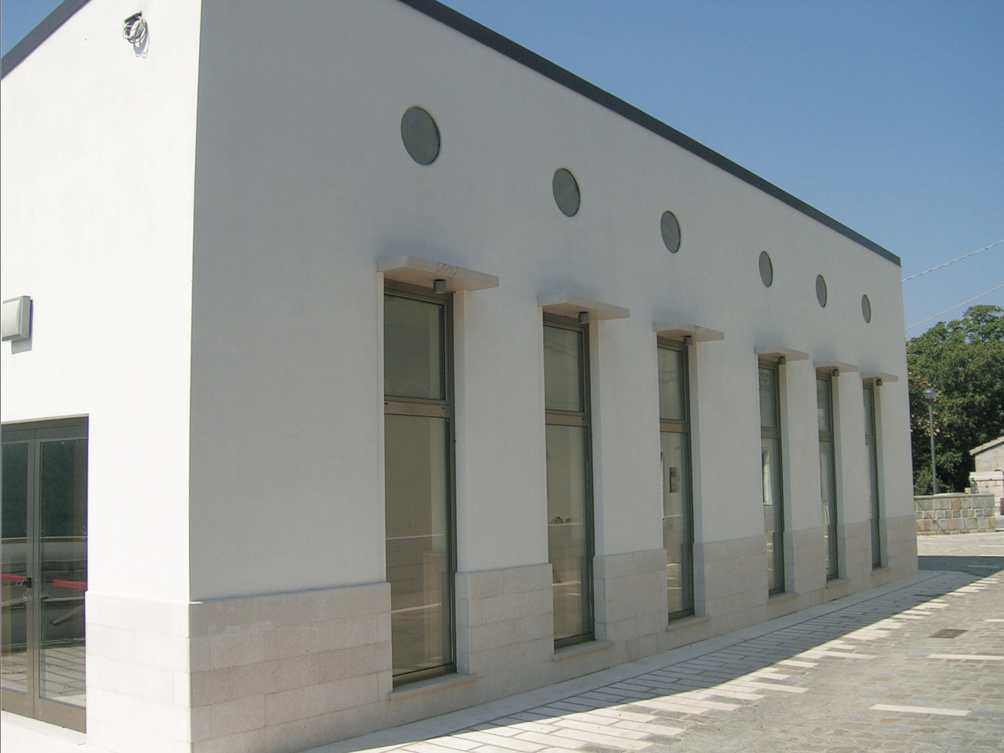 Centro visite Tuppo dei Sassi - contrada Carpini, Filiano (PZ); foto del Comune di Filiano, 26 luglio 2012, N40.82419°E15.77758